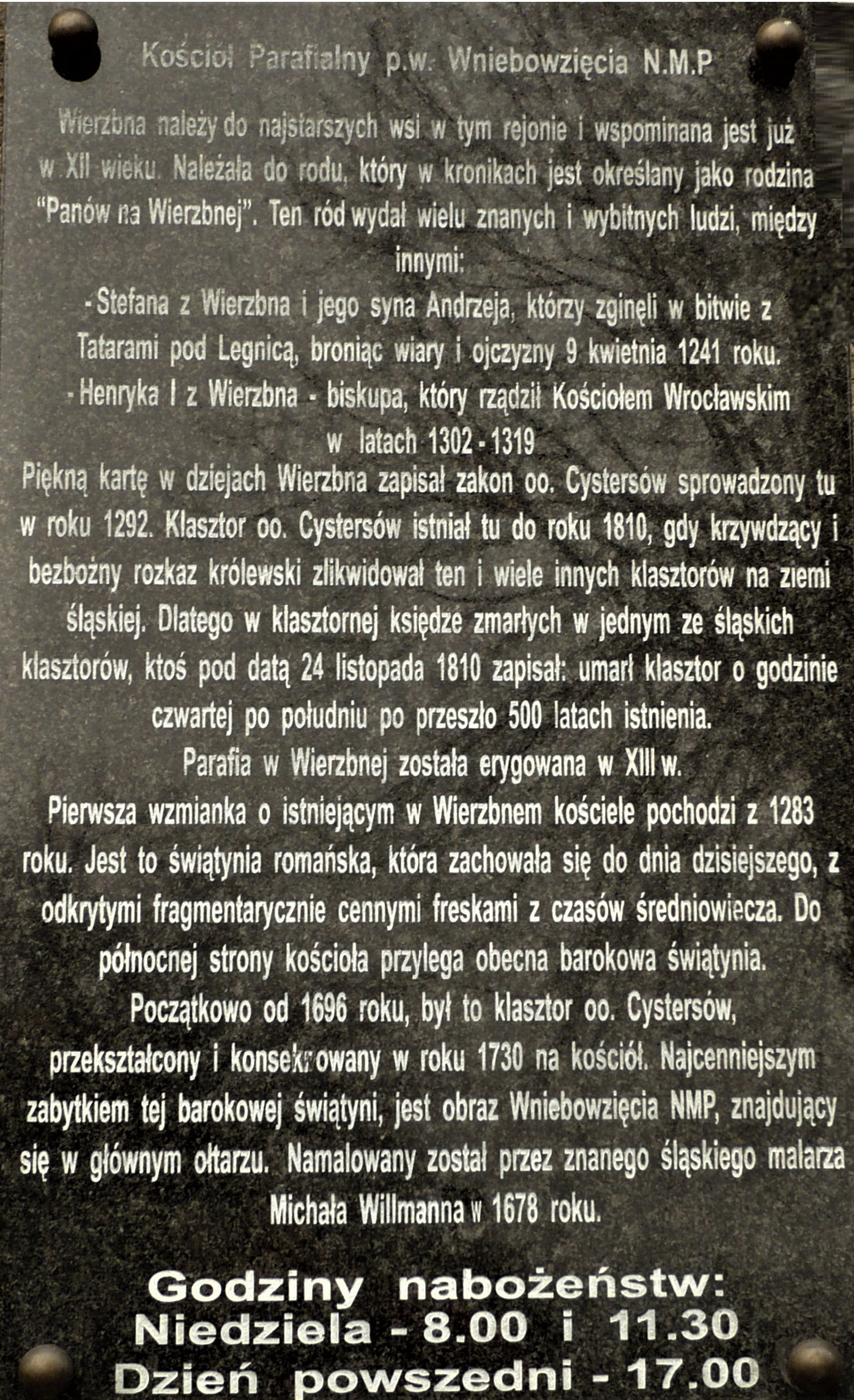 Kościół w Wierzbnej